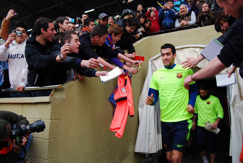 Sergio Busquets, seguido de Pinto, encabezan la salida de vestuarios del FC Barcelona, en el estadio del Reus Deportiu con motivo de la celebración de su centenario.